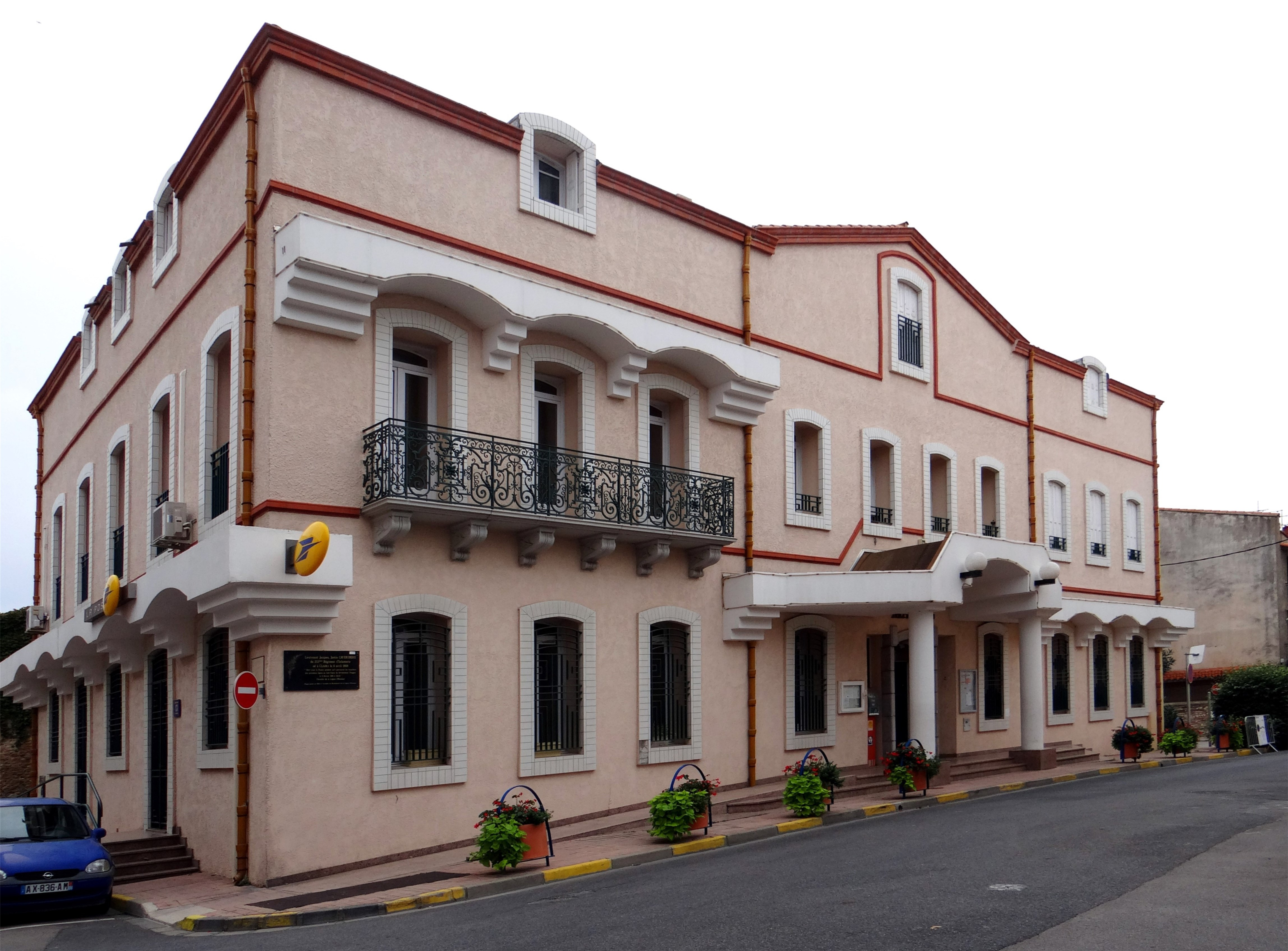 Hôtel de ville et bureau de poste, Claira, Pyrénées-Orientales, France.